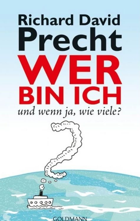 Richard David Precht: Wer bin ich - und wenn ja, wie viele? Goldmann Verlag, München 2007. DNB